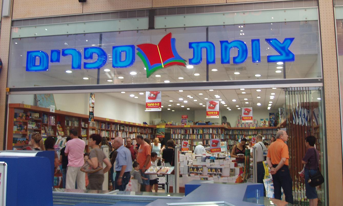 חנות של צומת ספרים בקניון שבעת הכוכבים בהרצליה. צילם דוד שי